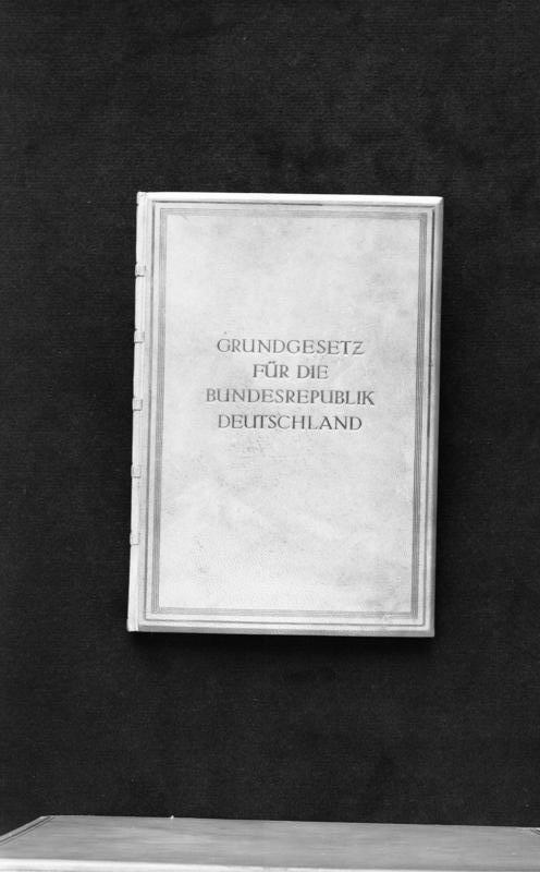 (Originaldruck des) Grundgesetz der Bundesrepublik Deutschland